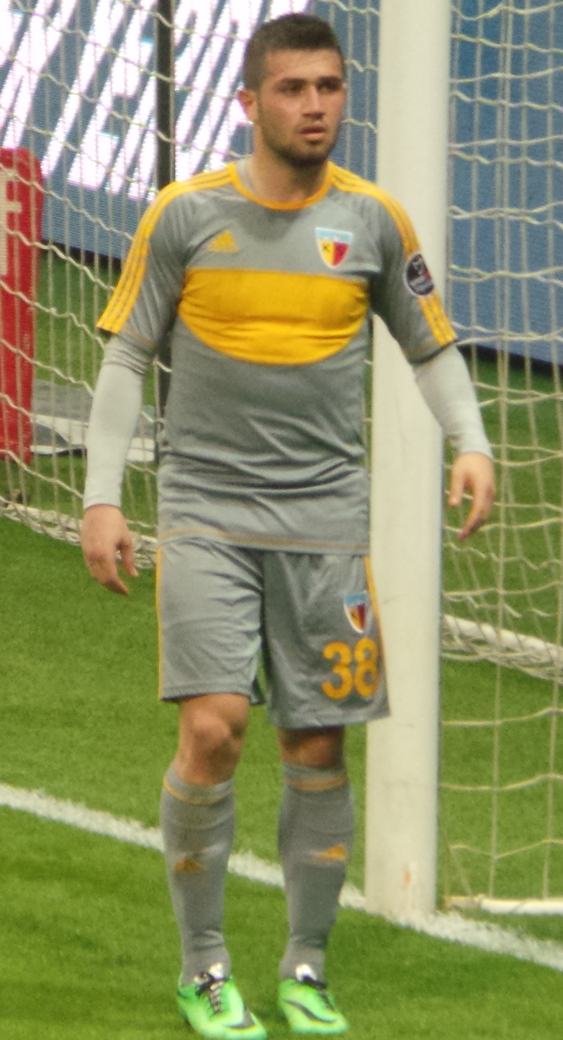 Ömer Bayram'14